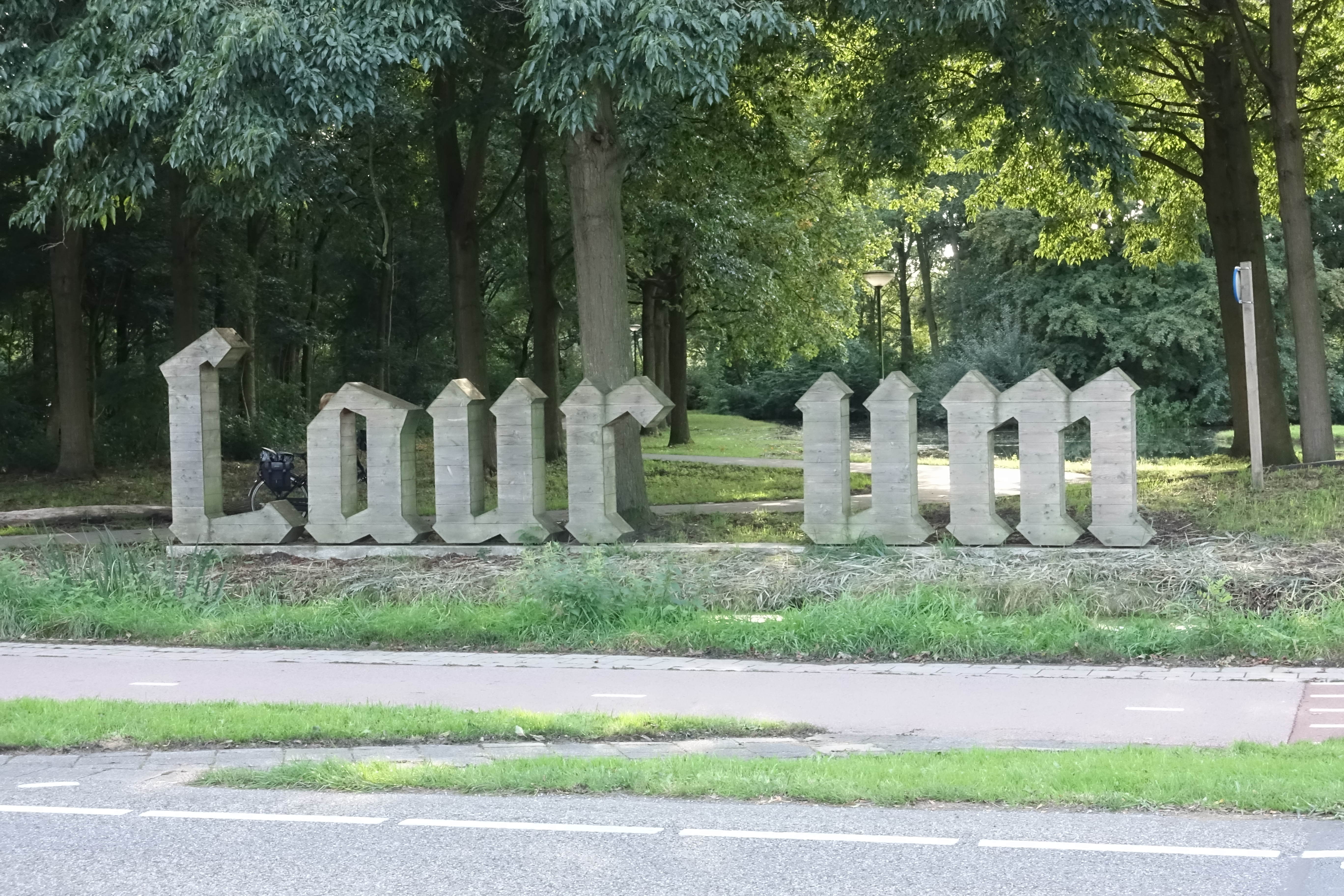 Fontein spelende kinderen, stationsplein Woerden